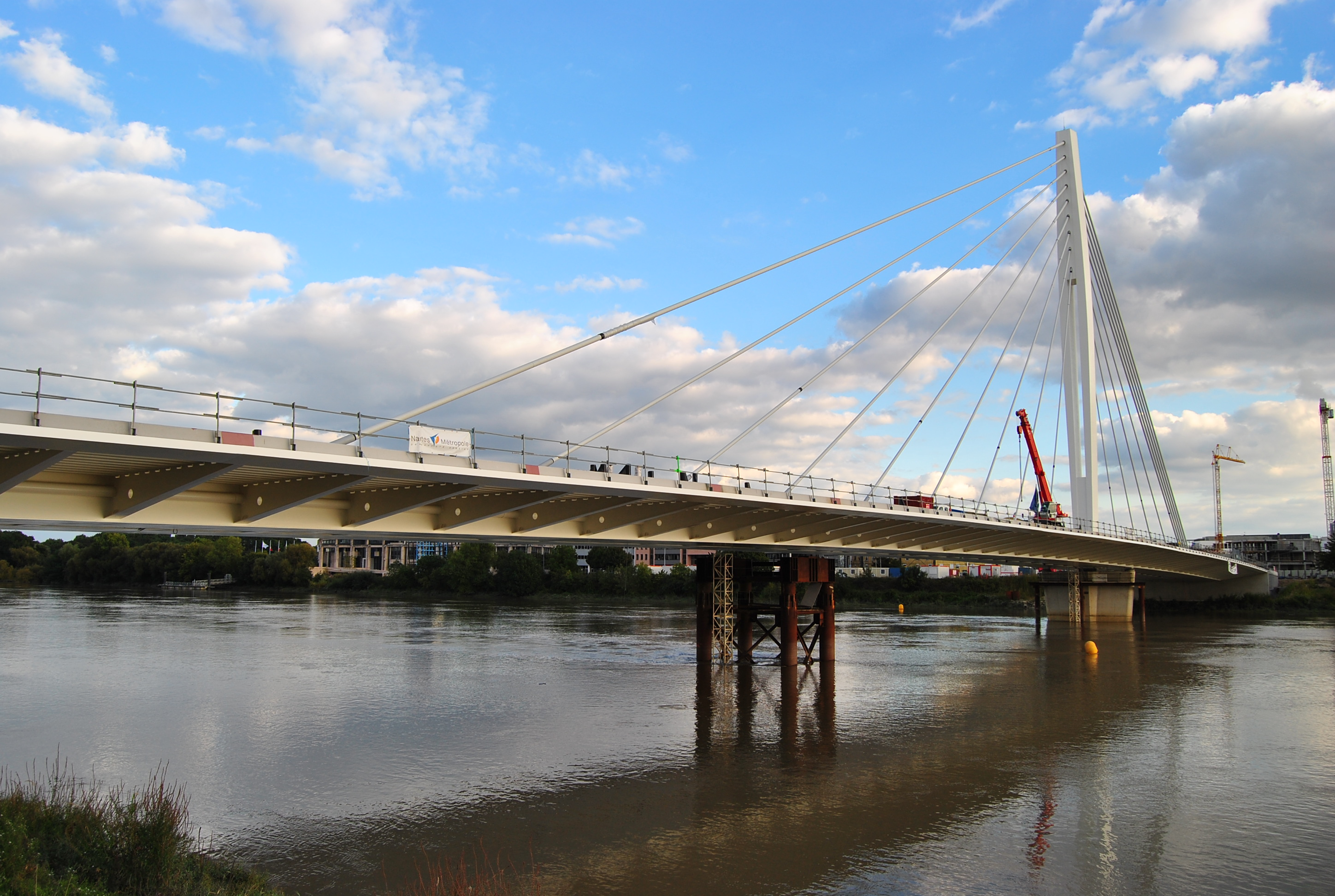 A Nantes, le Pont Éric Tabarly en construction en septembre 2010, vu du nord-ouest.